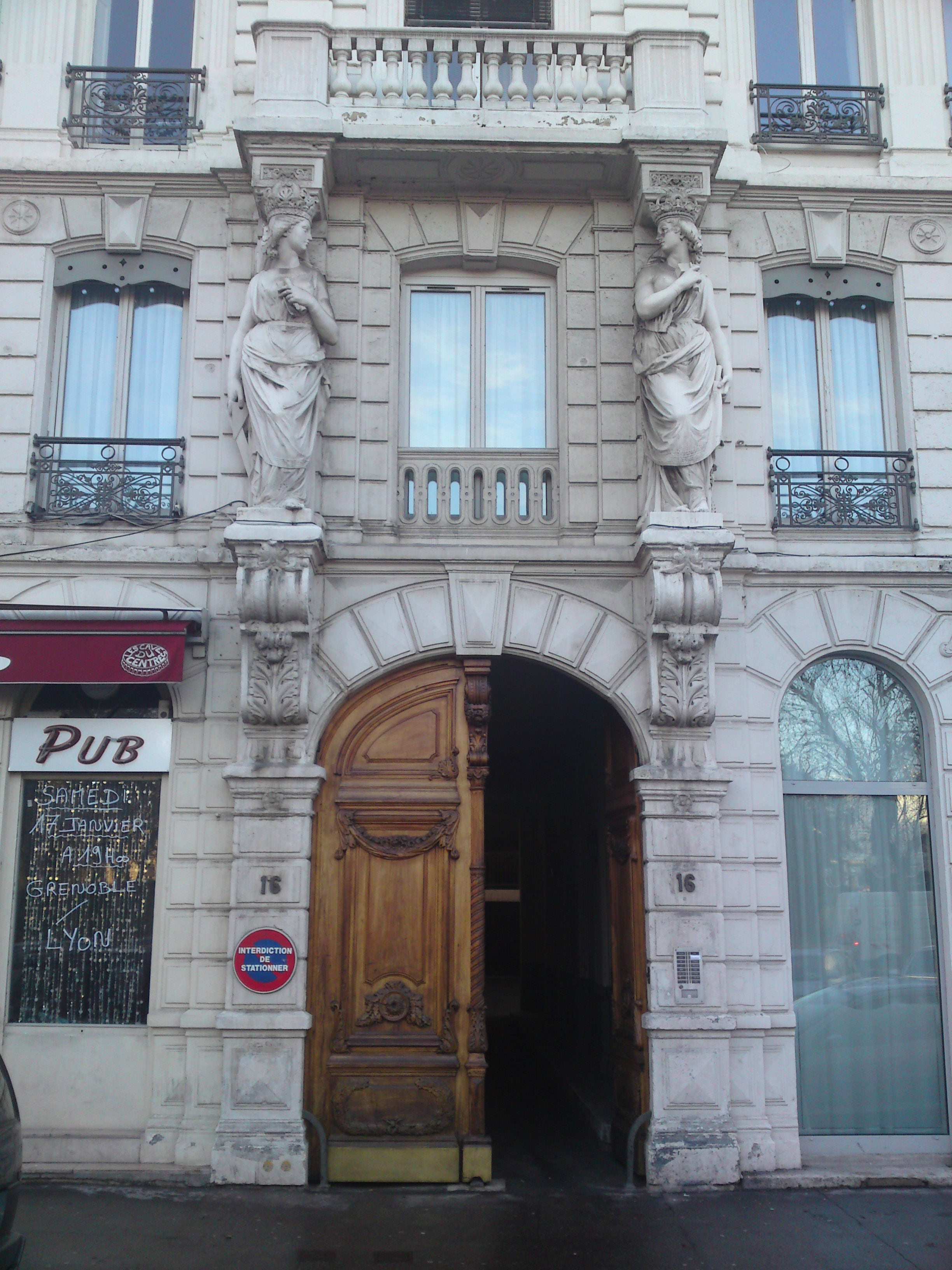 sculptures en vis à vis 16 place Carnot, Lyon France